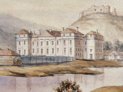 Vilnius Castle and Sluškai Palace, Vilnius Lithuania